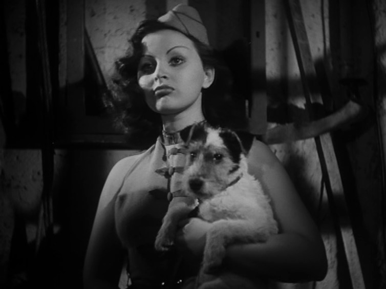 Scena dal film Vita da cani (1950)